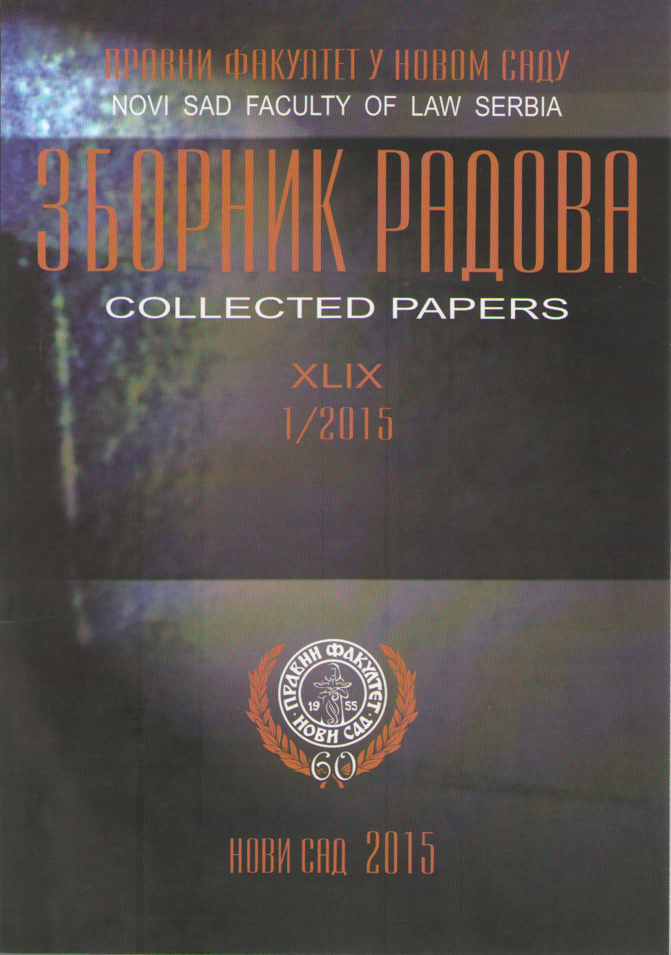 Zbornik radova Pravnog Fakulteta u Novom Sadu